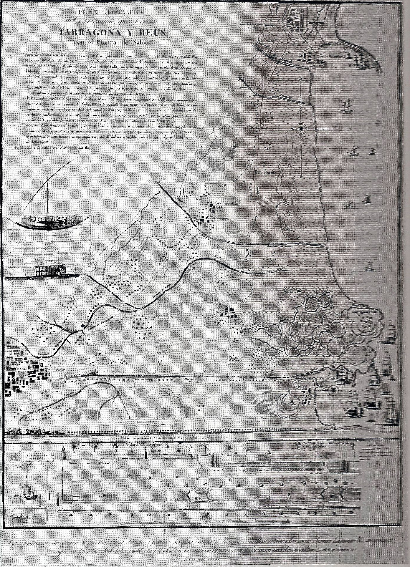 Plànol general del projecte del Canal de Reus a Salou